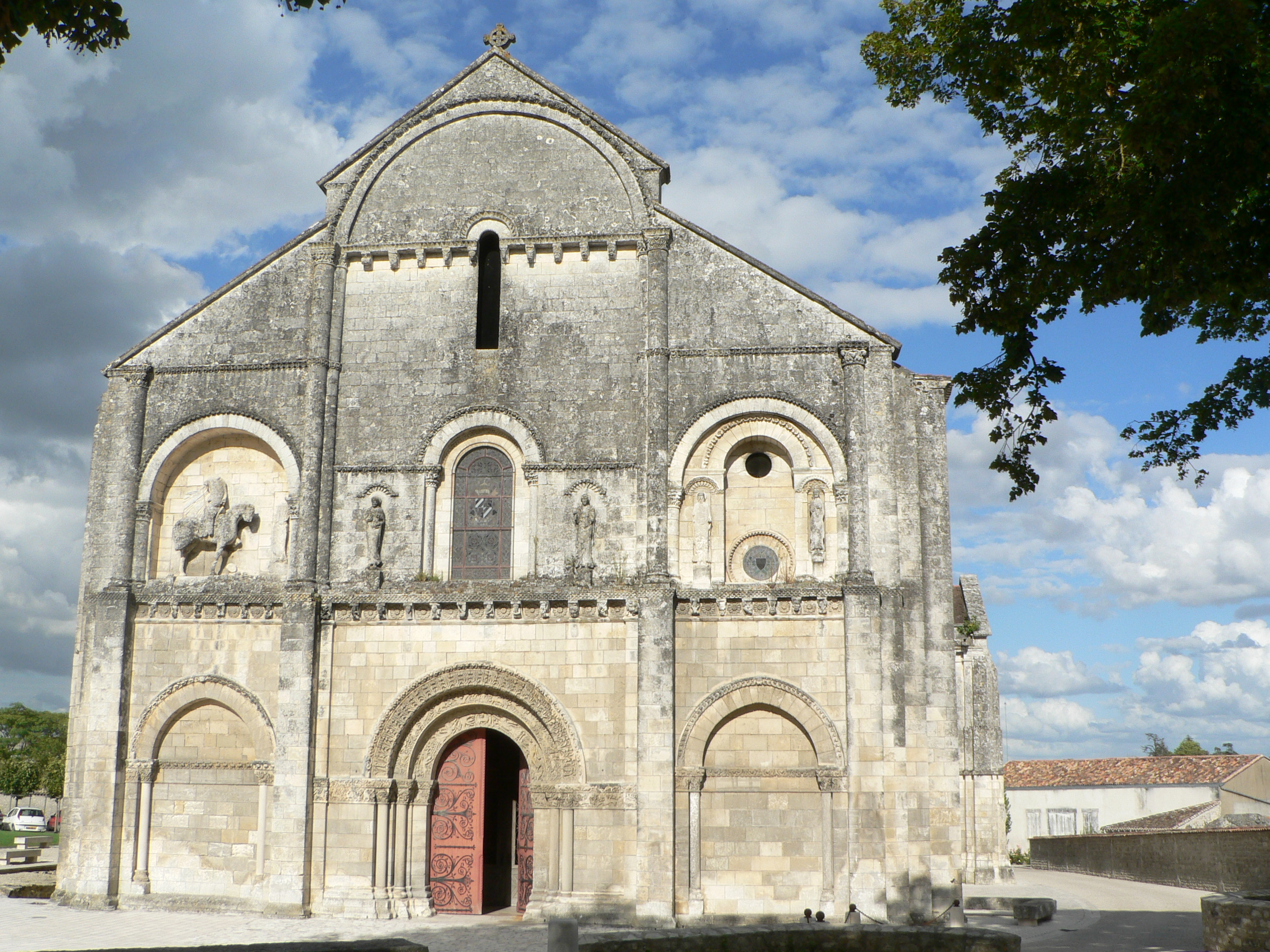 fronton de l'église de Châteauneuf-sur-Charente